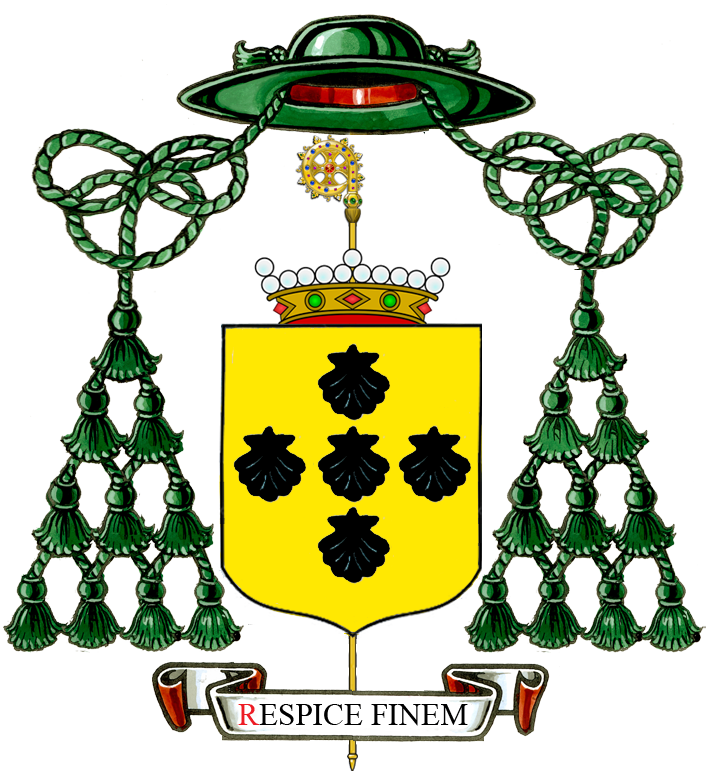 Wapenschild van Philippus Erardus van der Noot